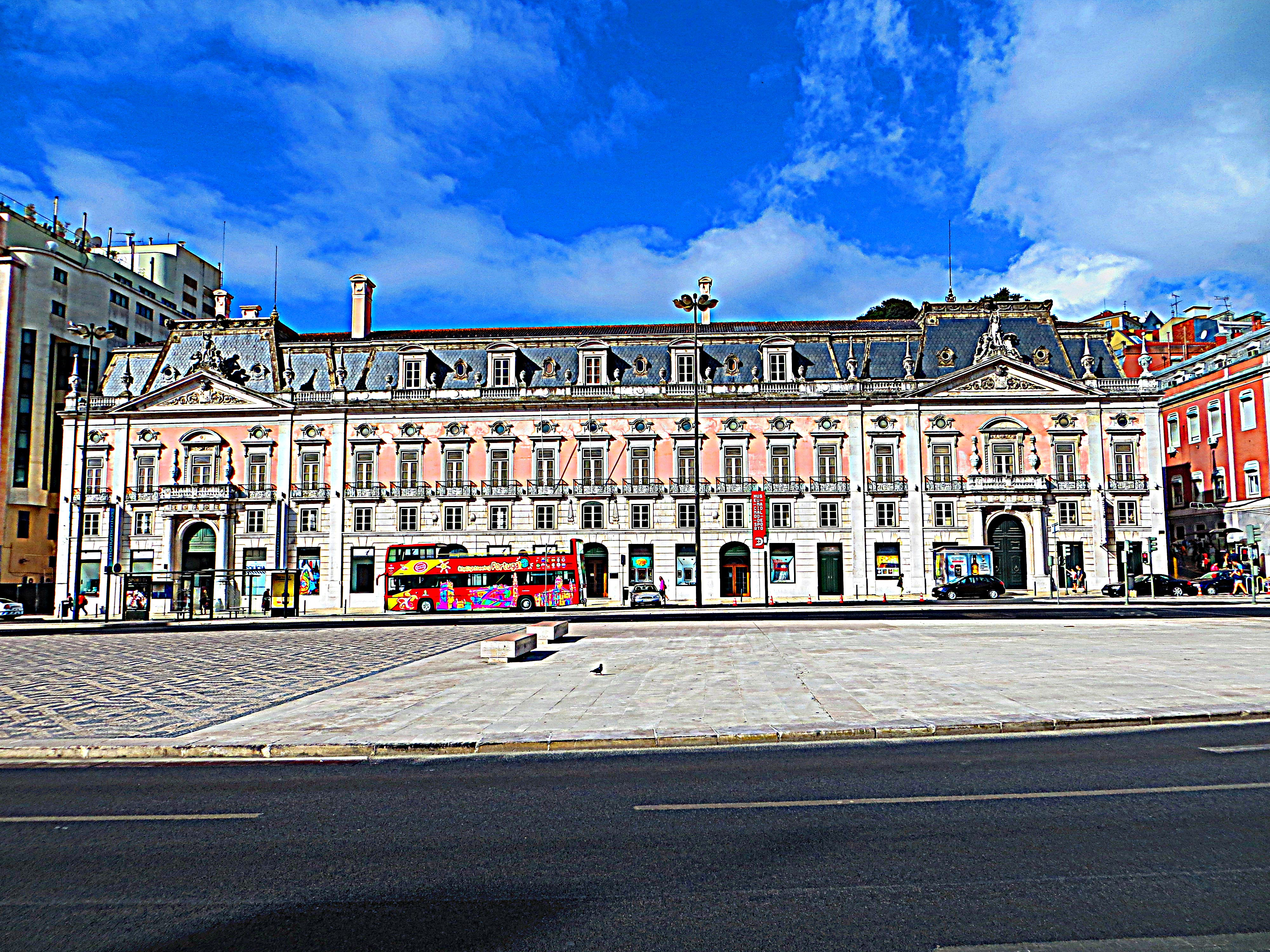 Praça Restauradores - Palacio Foz